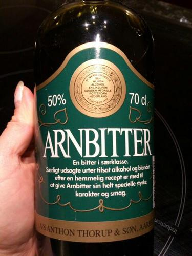 Arnbitter